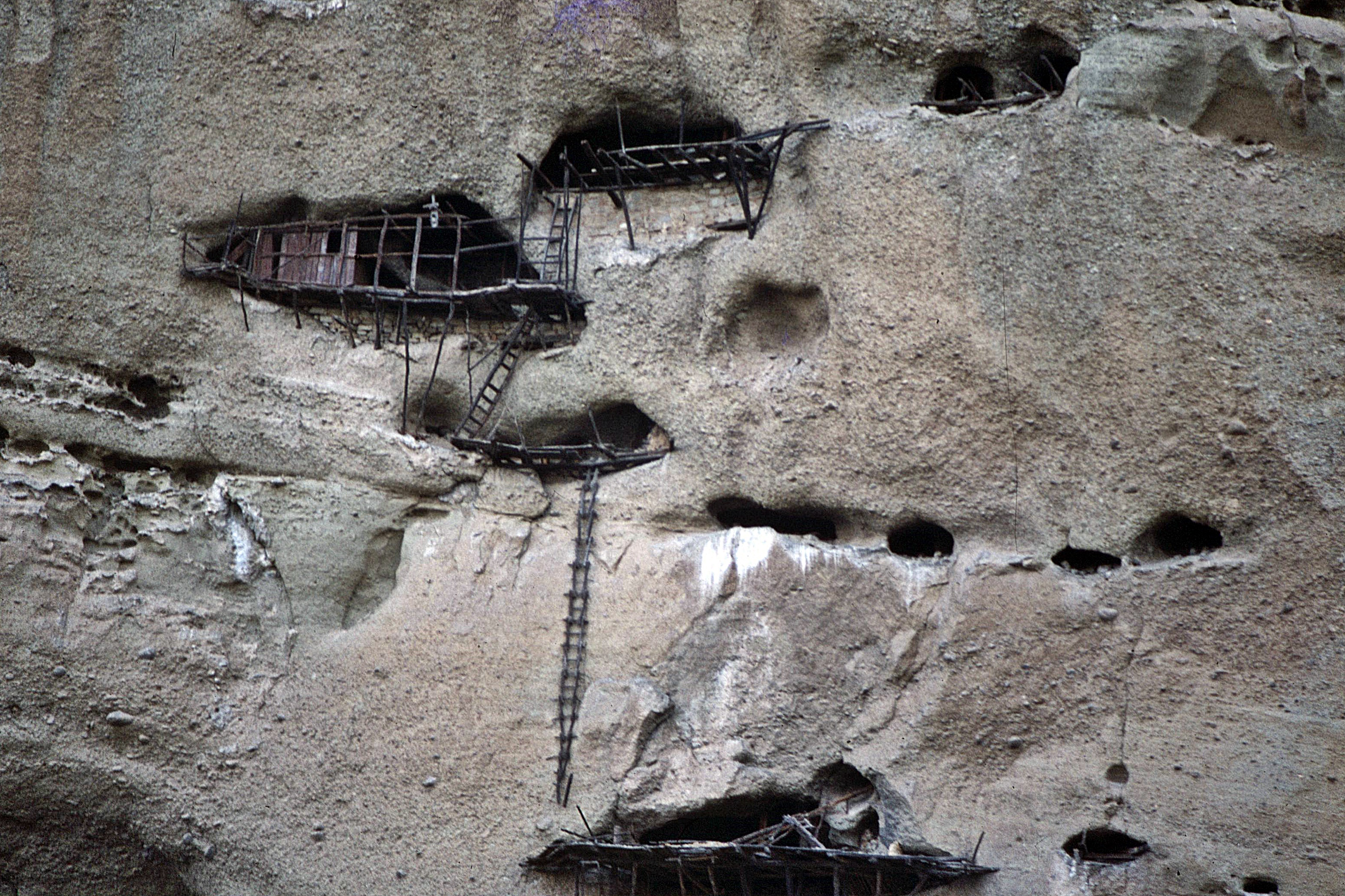 Klausen bei Kalambaka/Meteora